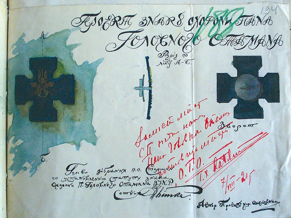 Архівний документ